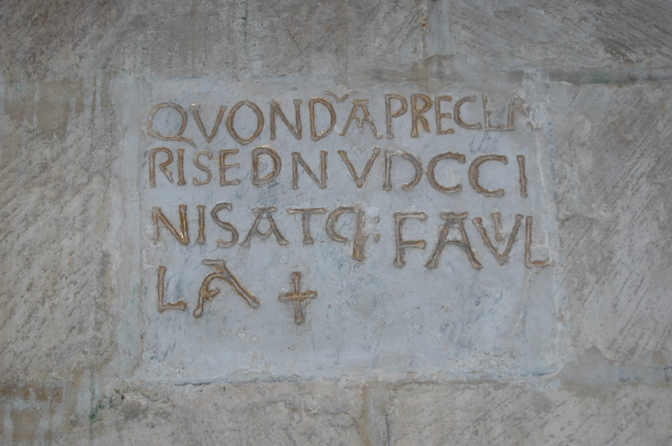 Inscription se trouvant sur un mur de l'église de l'église Église Notre-Dame-de-l'Assomption de Vouvant